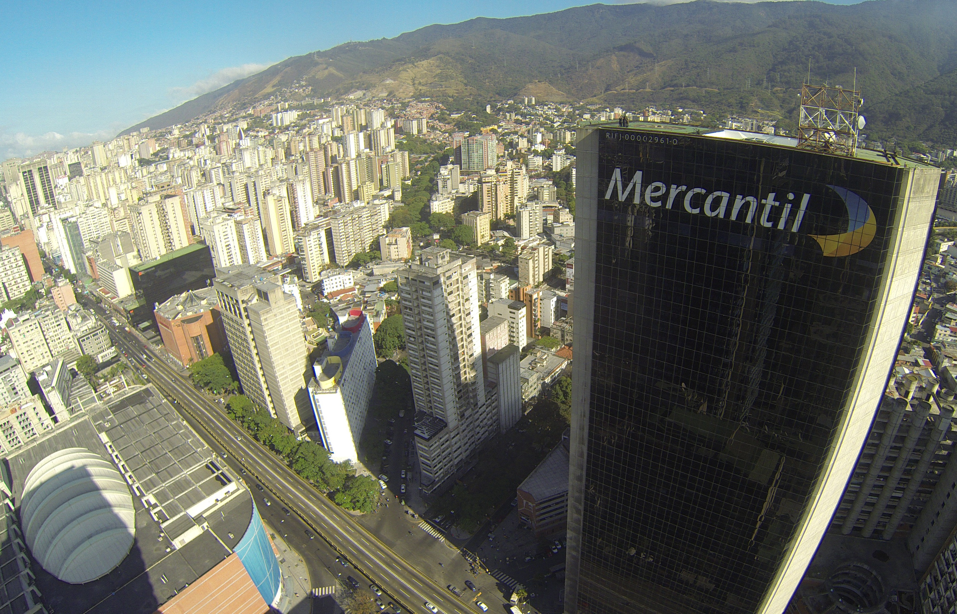 Edificio Mercantil